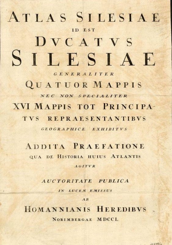 Česky: Titulní strana Atlasu Slezska